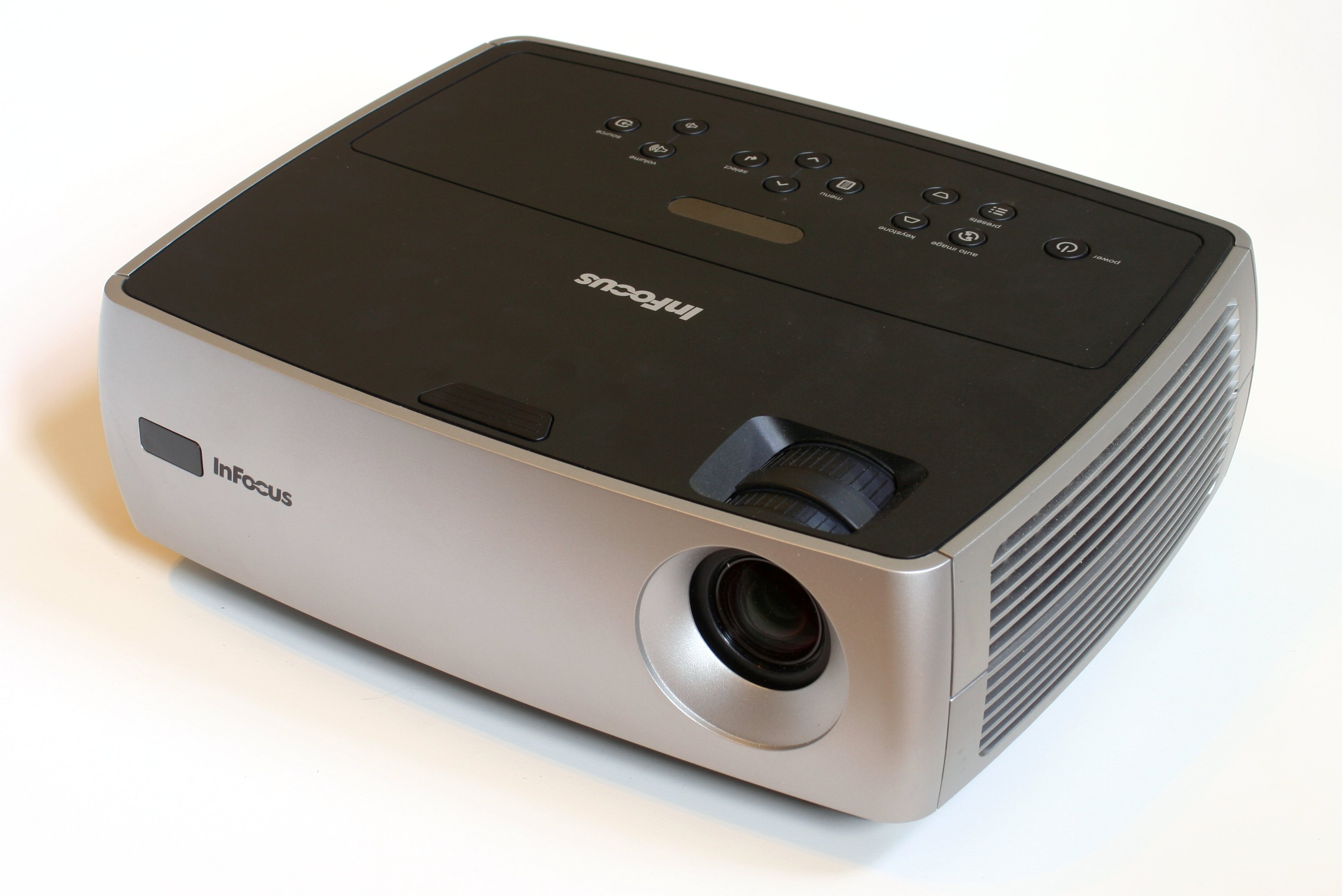 InFocus IN26+ DLP video projector